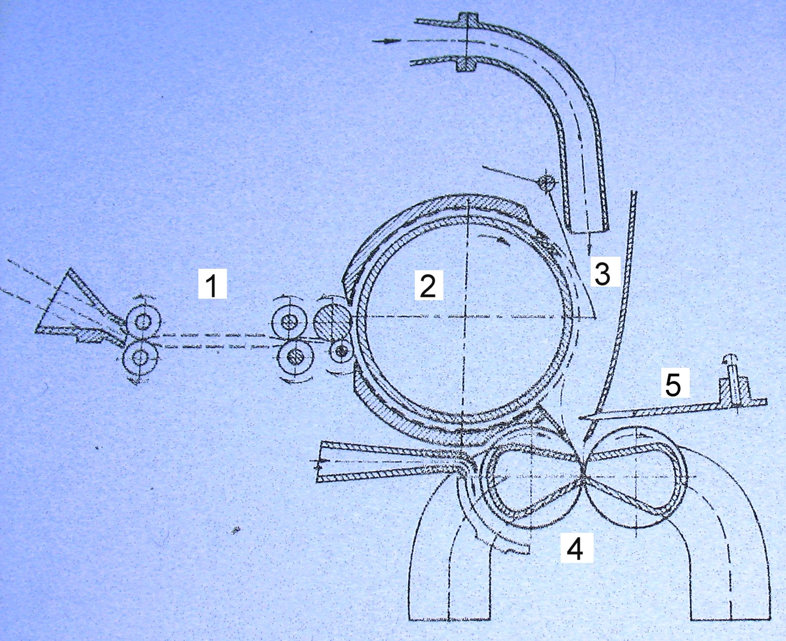 Schema:Friktionsspinnen